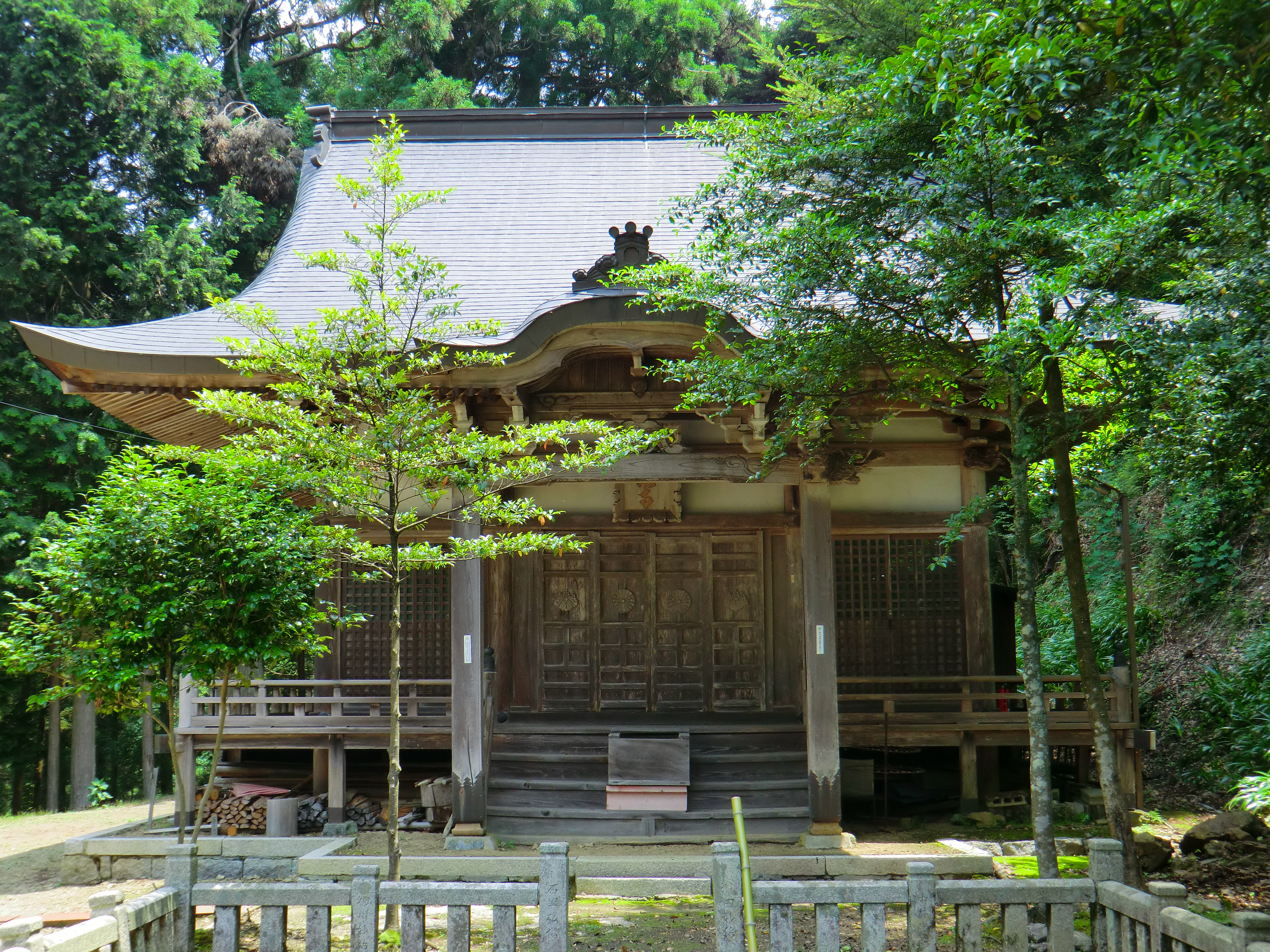 鳳閣寺（黒滝村）